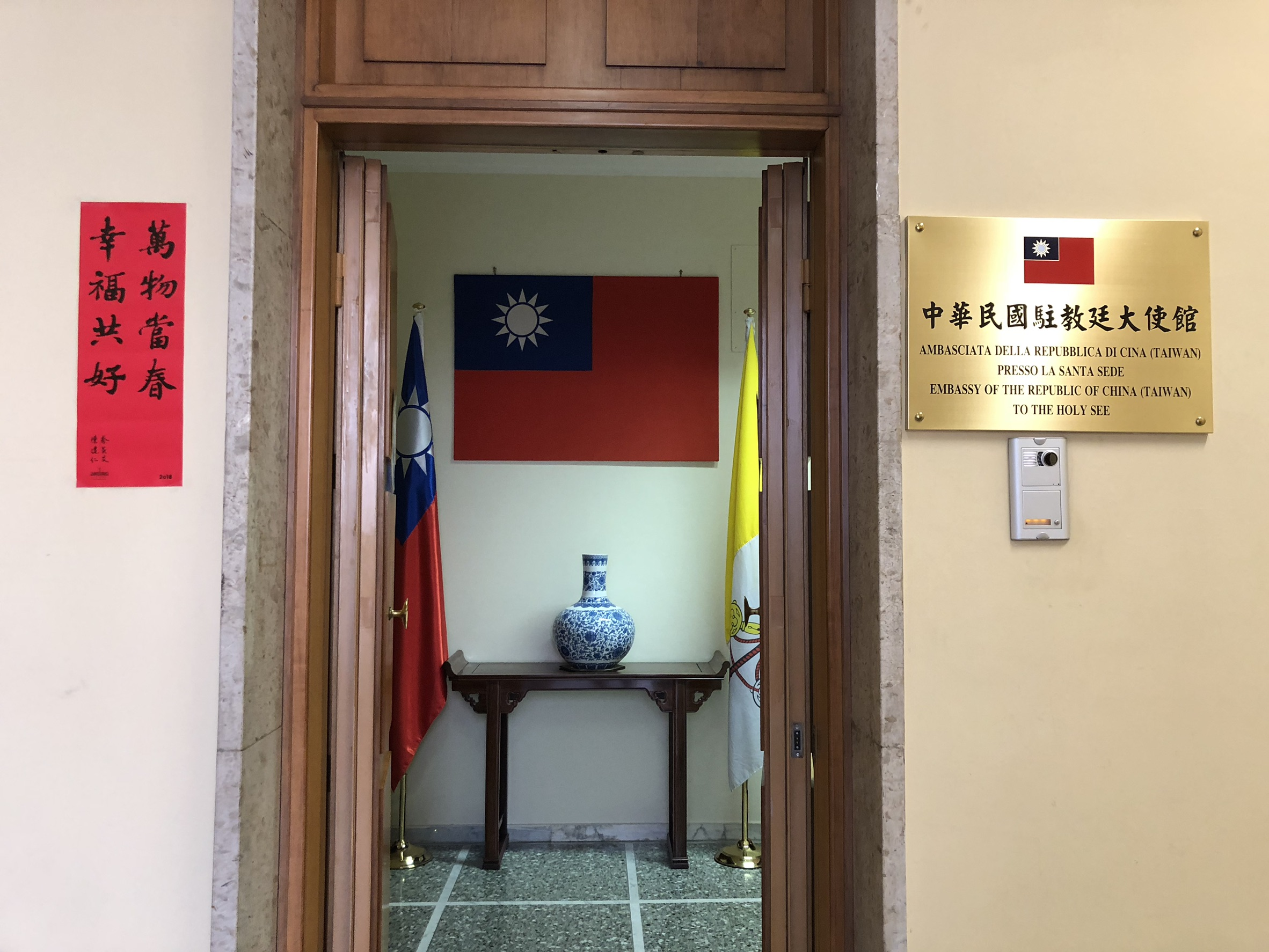 10.12 「聖誼專案」副總統視察駐教廷大使館